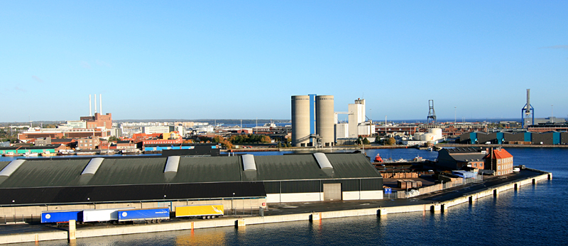 Nordhavnen, København.